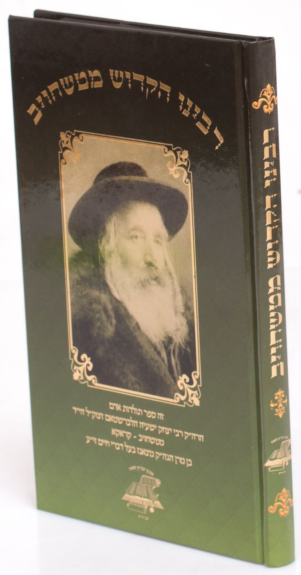 רבי יצחק ישעיה הלברשטאם מטשחויב - קראקא